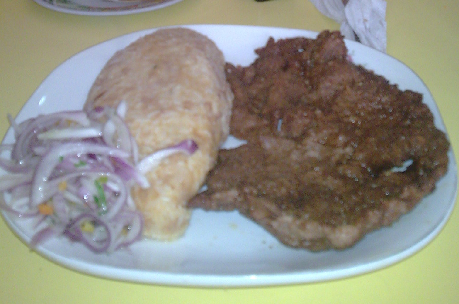 Tacu-tacu servido con carne apanada y sarsa criolla. Se observa también una botella de aceite de oliva y de salsa de ají. Rstaurant Superba. Distrito de San Isidro. Lima - Perú.